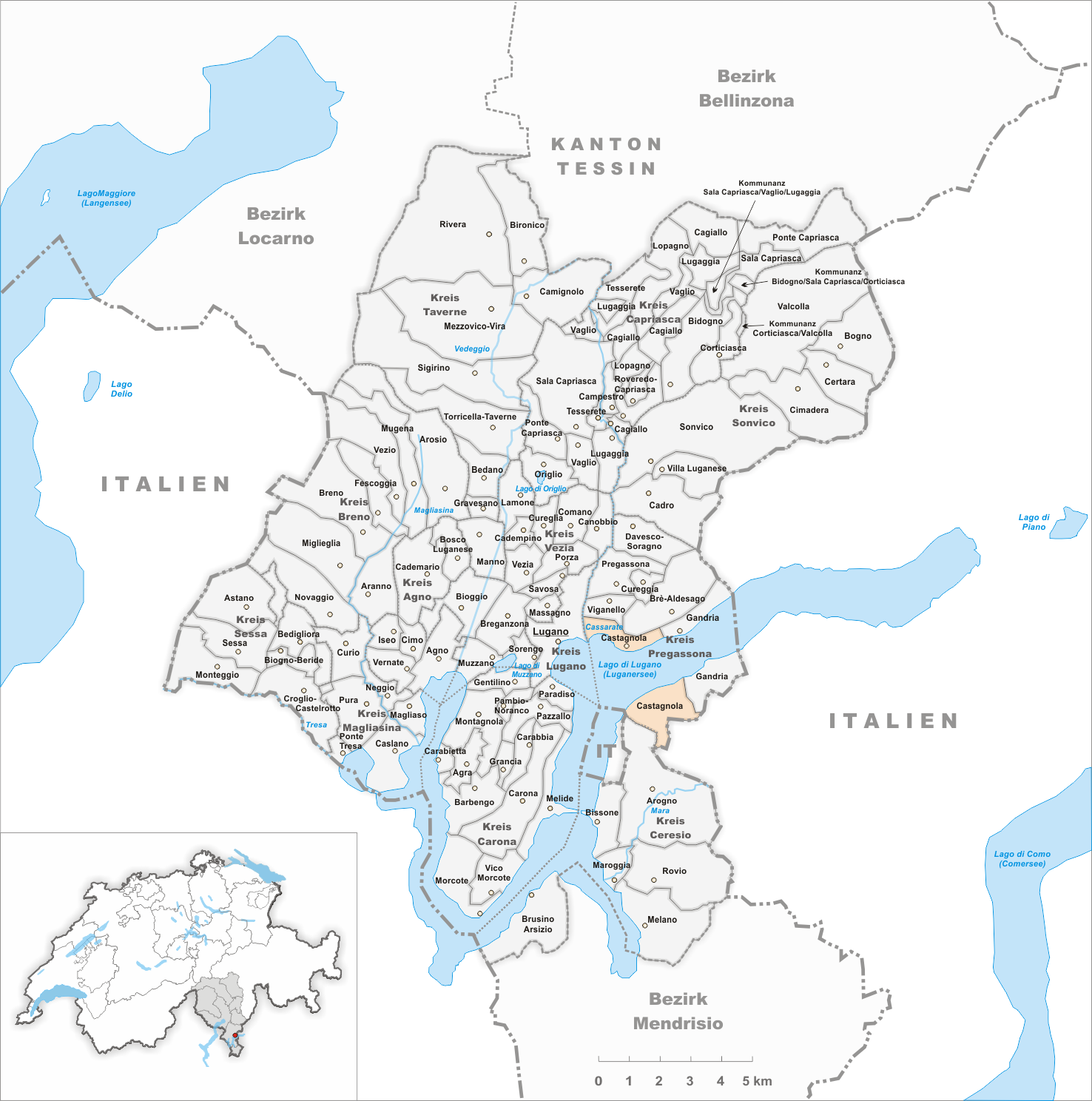 Municipality Castagnola Artist: Tschubby